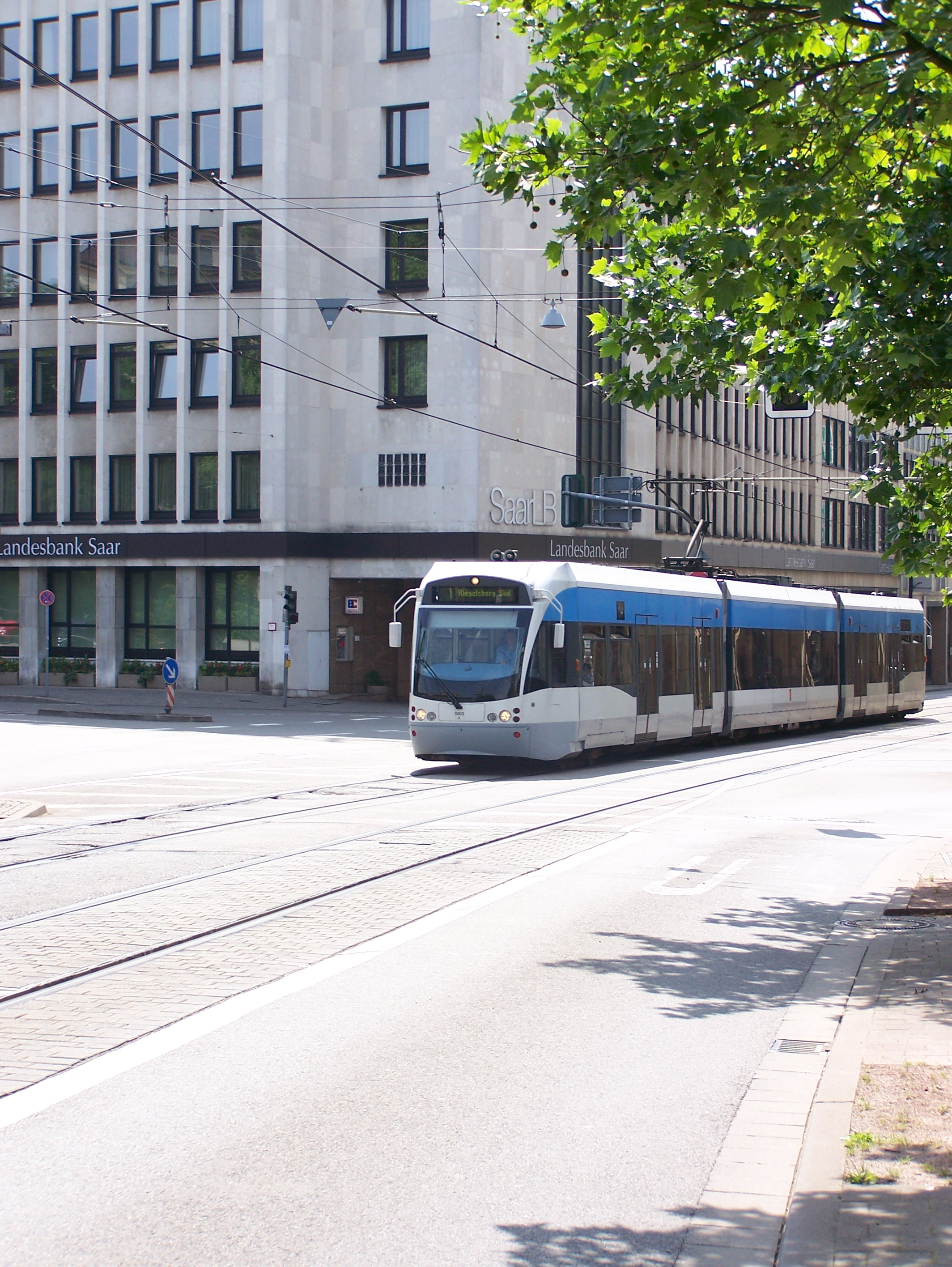 Saarbrücker Stadtbahnwagen 1005 als Linie 1 Richtung Riegelsberg-Süd zwischen den Haltestellen Kaiserstraße und Hauptbahnhof vor der Saarländischen Landesbank (SaarLB)